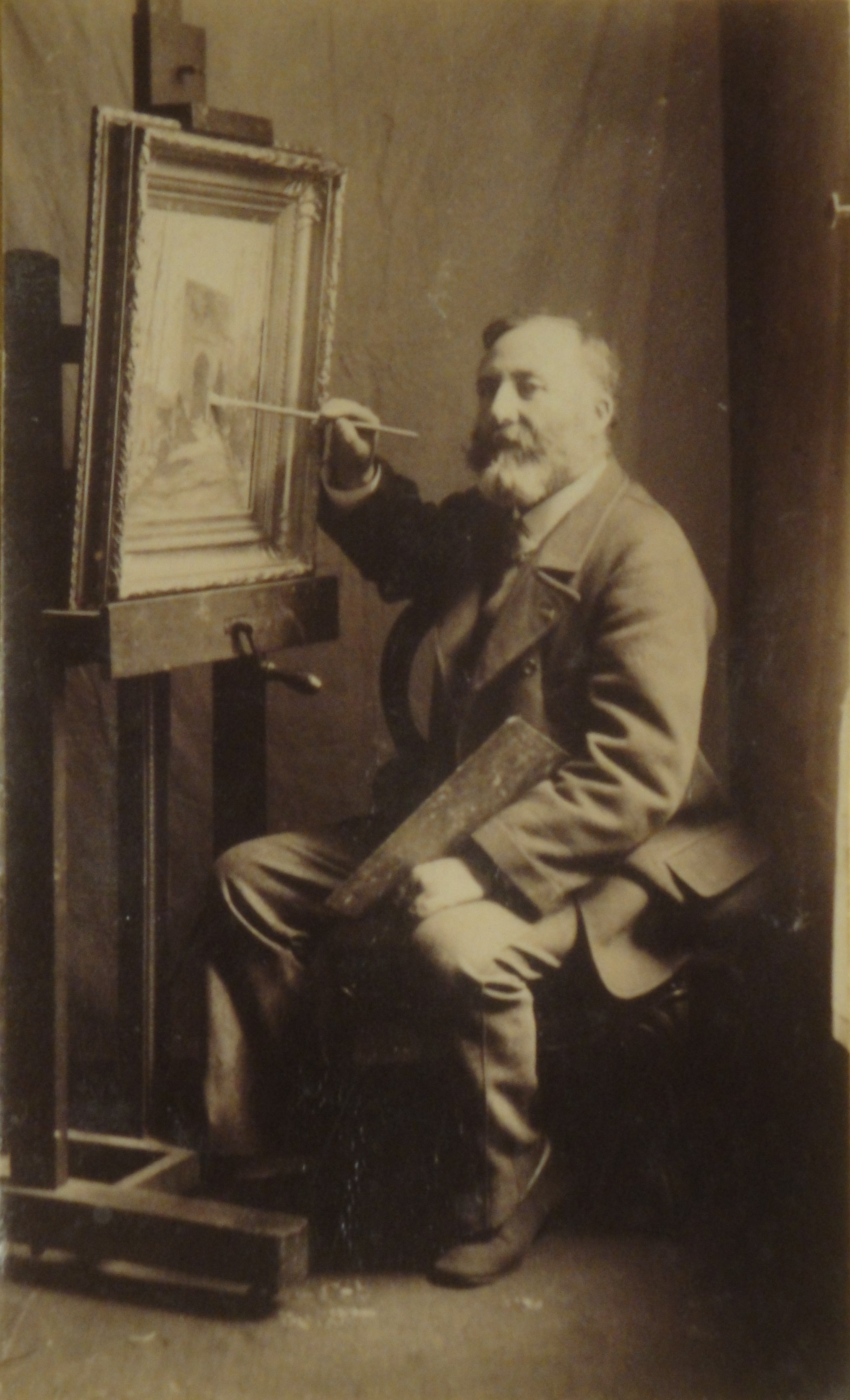 Charles Longueville, lieutenant de vaisseau à Brest vers 1866